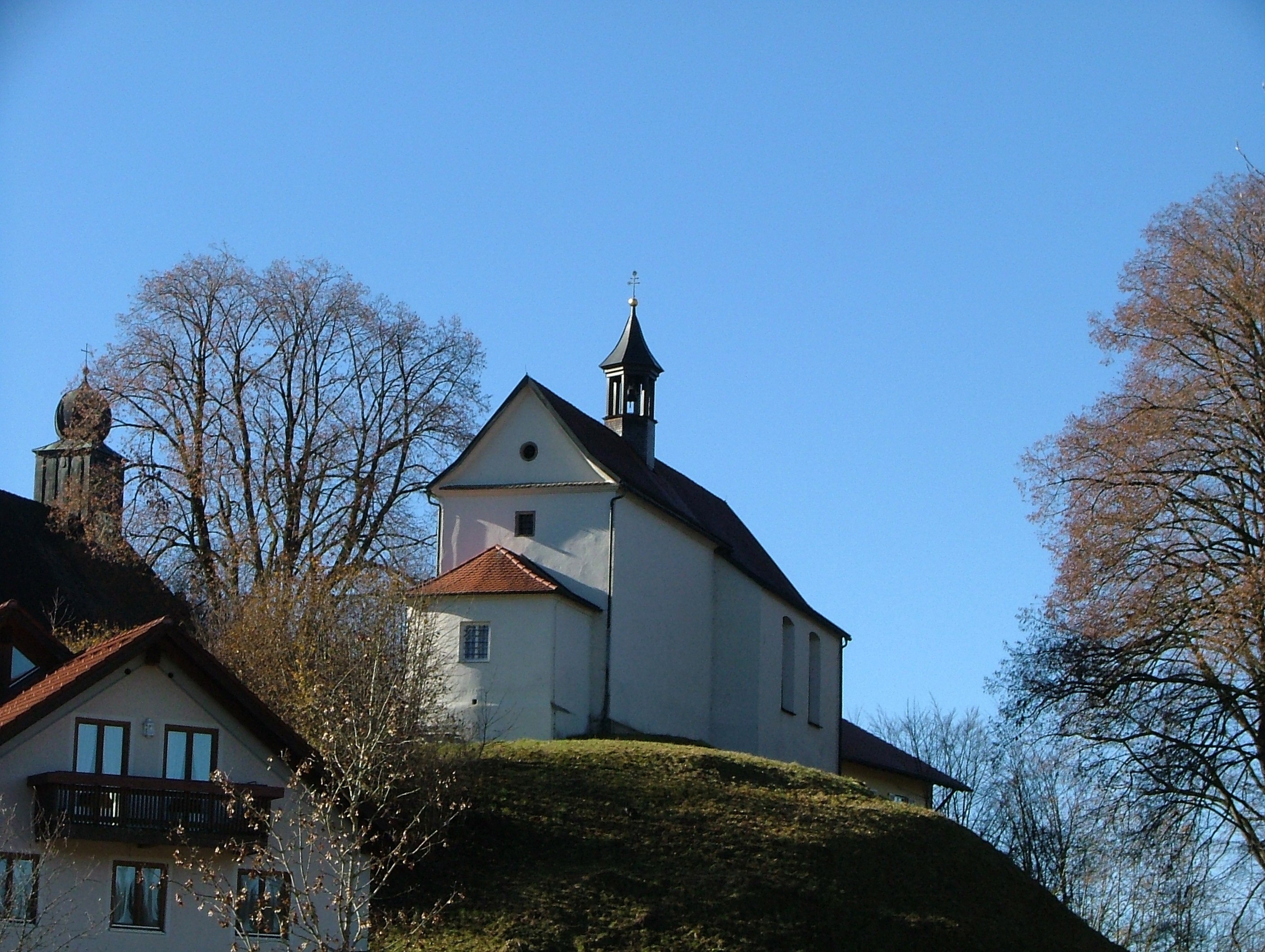 Bühl Loreto